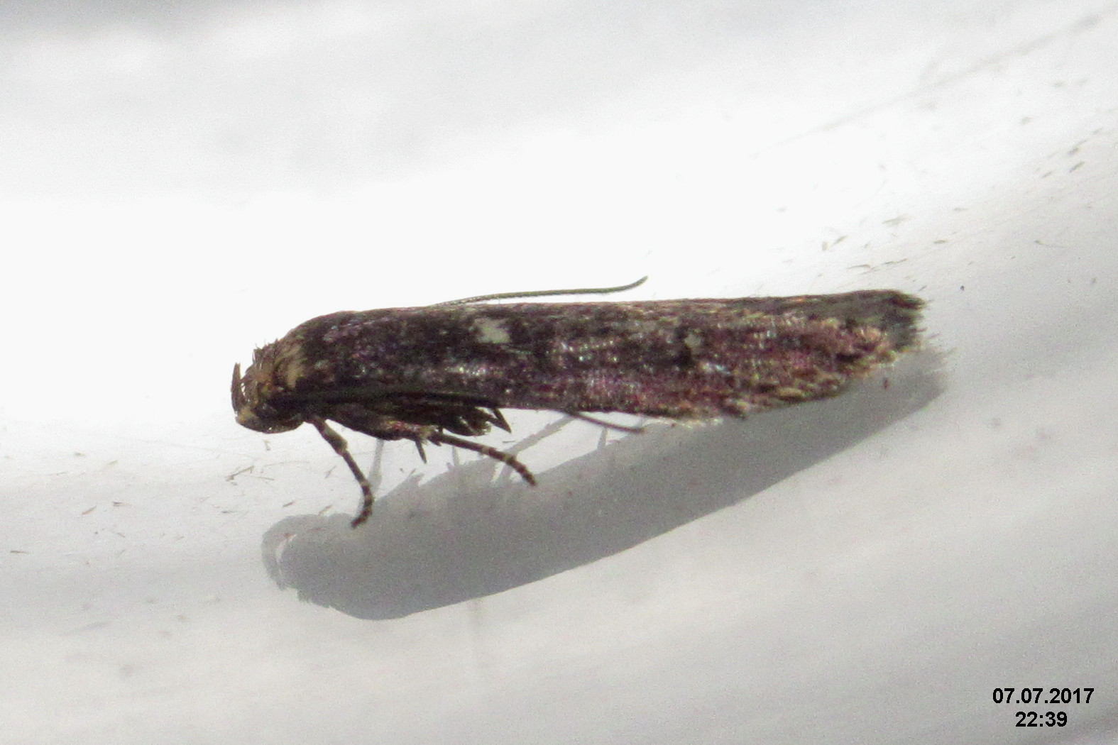 UK 41.002 - 0873 Furness dowd (Dingy dowd) - drsnohřbetka B. adustella - humusovka B. adustella.